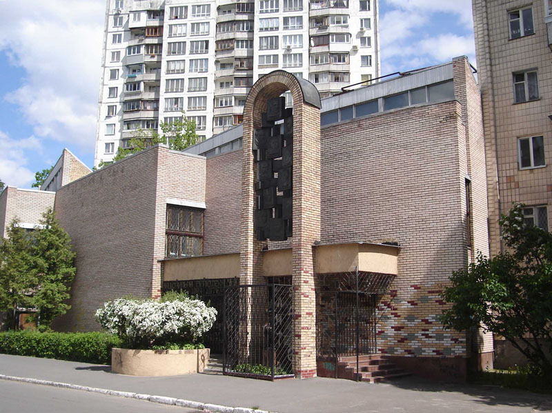 Фасад Детской библиотеке в Киеве